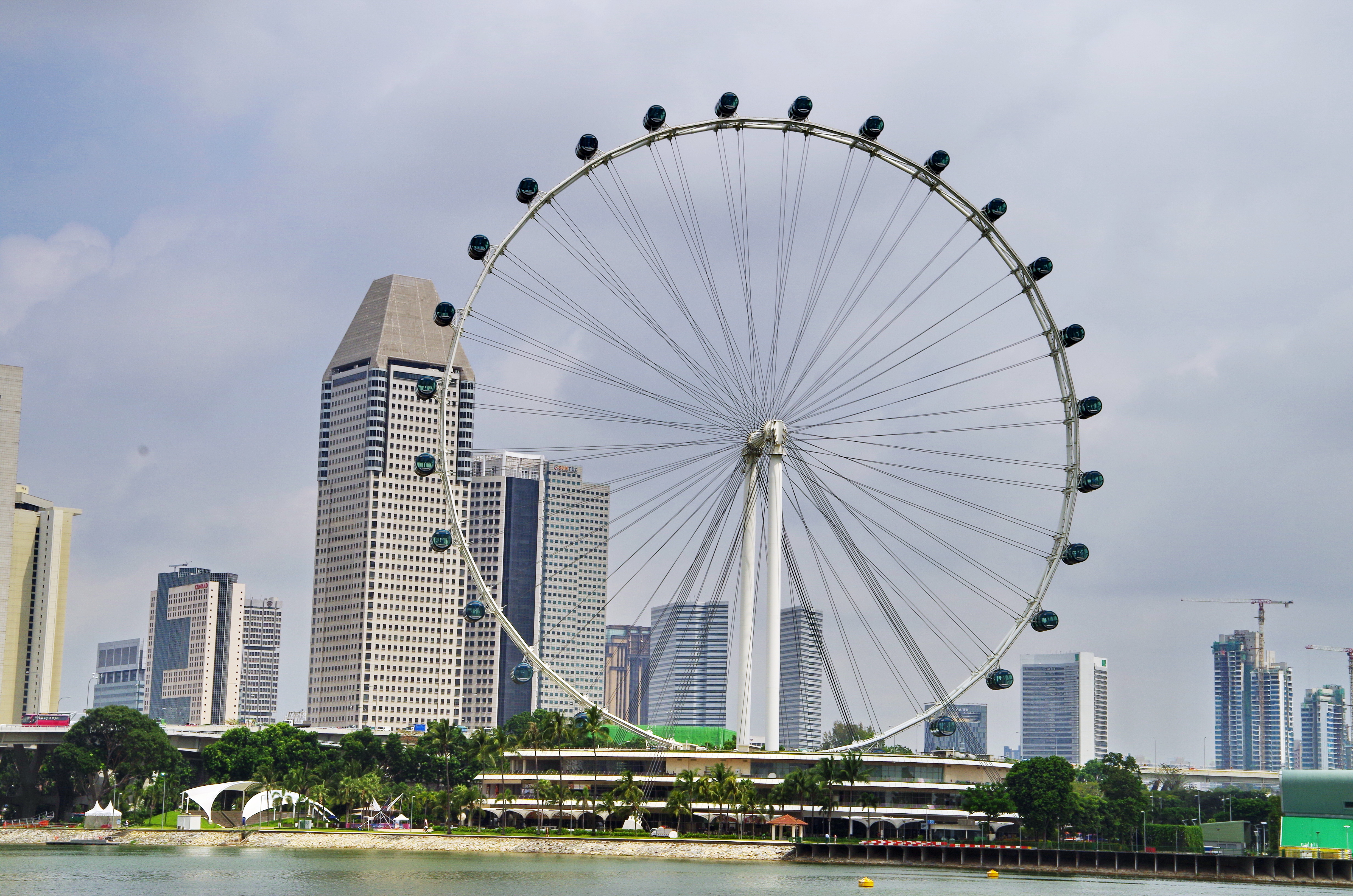 Singapore Flyer gesehen vom Bay South Garden